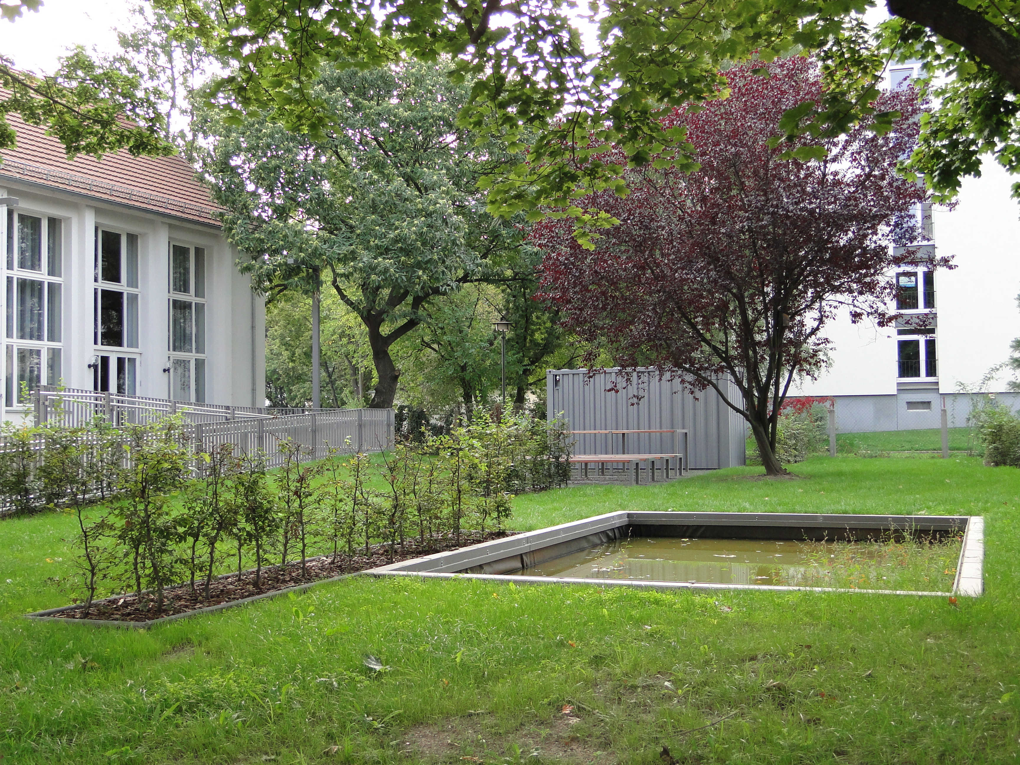 UNESCO-Projektgarten kurz nach der Wiedereröffnung des Marie-Curie-Gymnasiums Dresden 2014